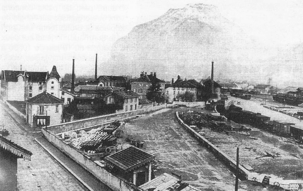 Brasserie de la Frise ; Grenoble début du XXe siècle